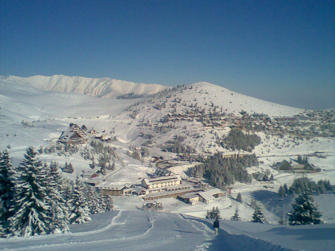 Поглед към Попова шапка в Шар планина.